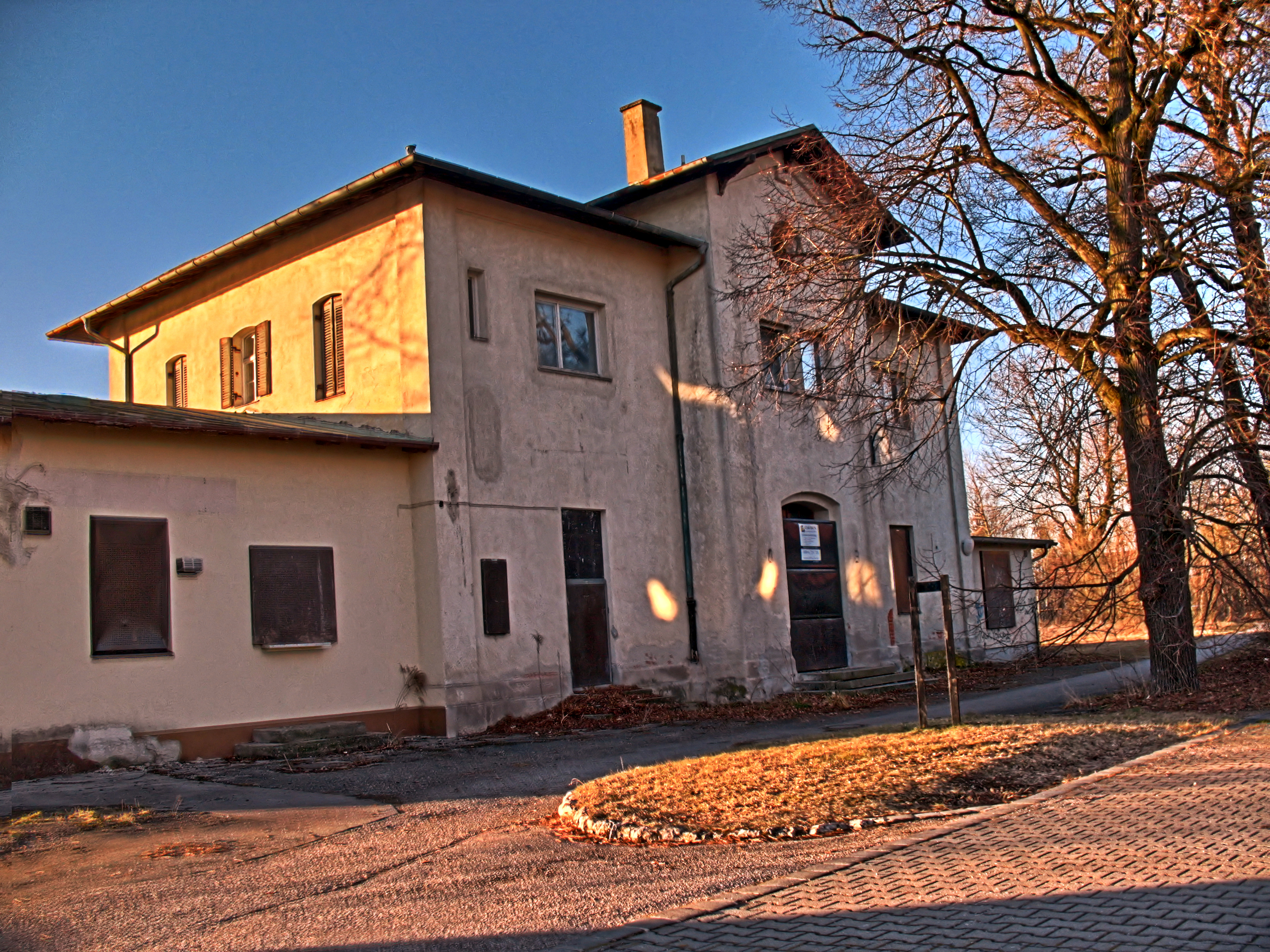 Deutschland, Bayern, Oberschleißheim, altes Bahnhofsgebäude an der Schönleutnerstraße